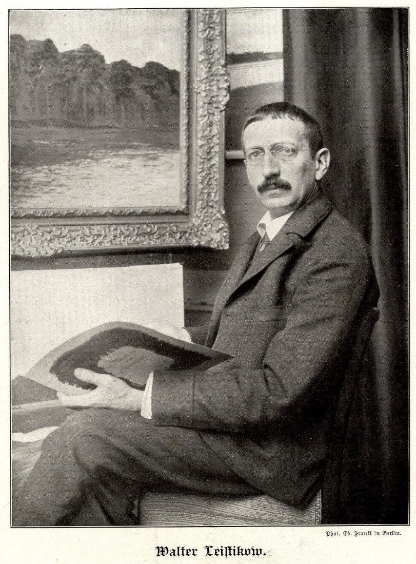 Walter Leistikow by Eduard Frankl